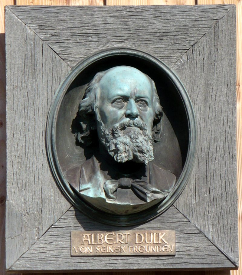 Büste von Albert Dulk am neuen Dulkhäusle in Esslingen